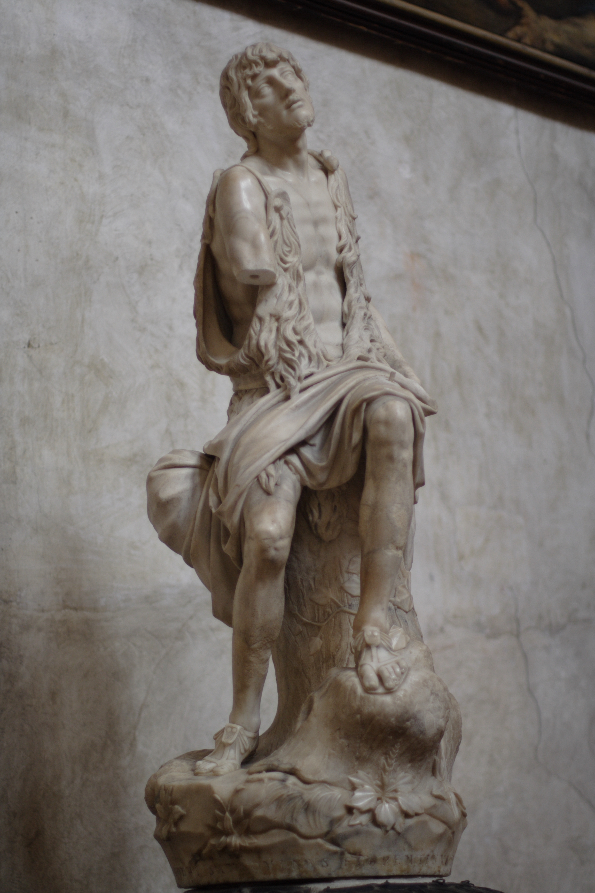 Basilica di Santa Maria Gloriosa dei Frari - St John the Baptist